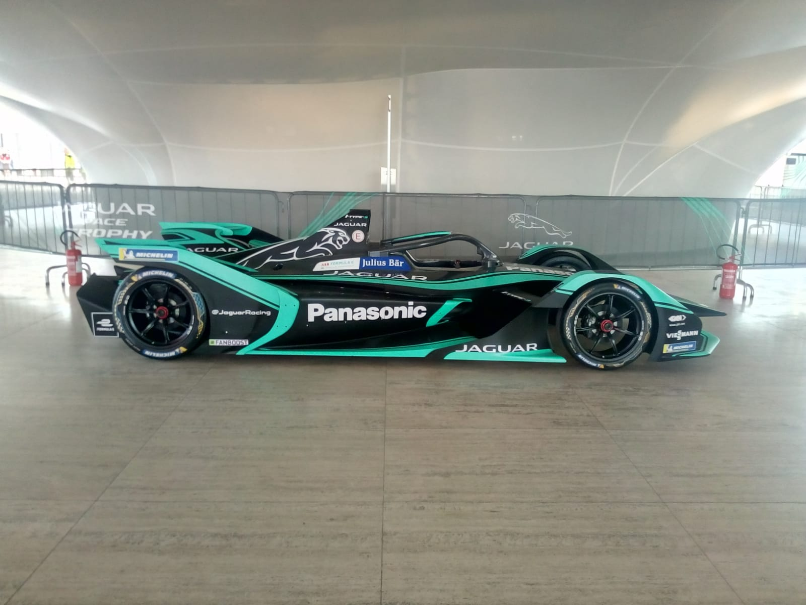 Formula E - Gran Premio di Roma 2019